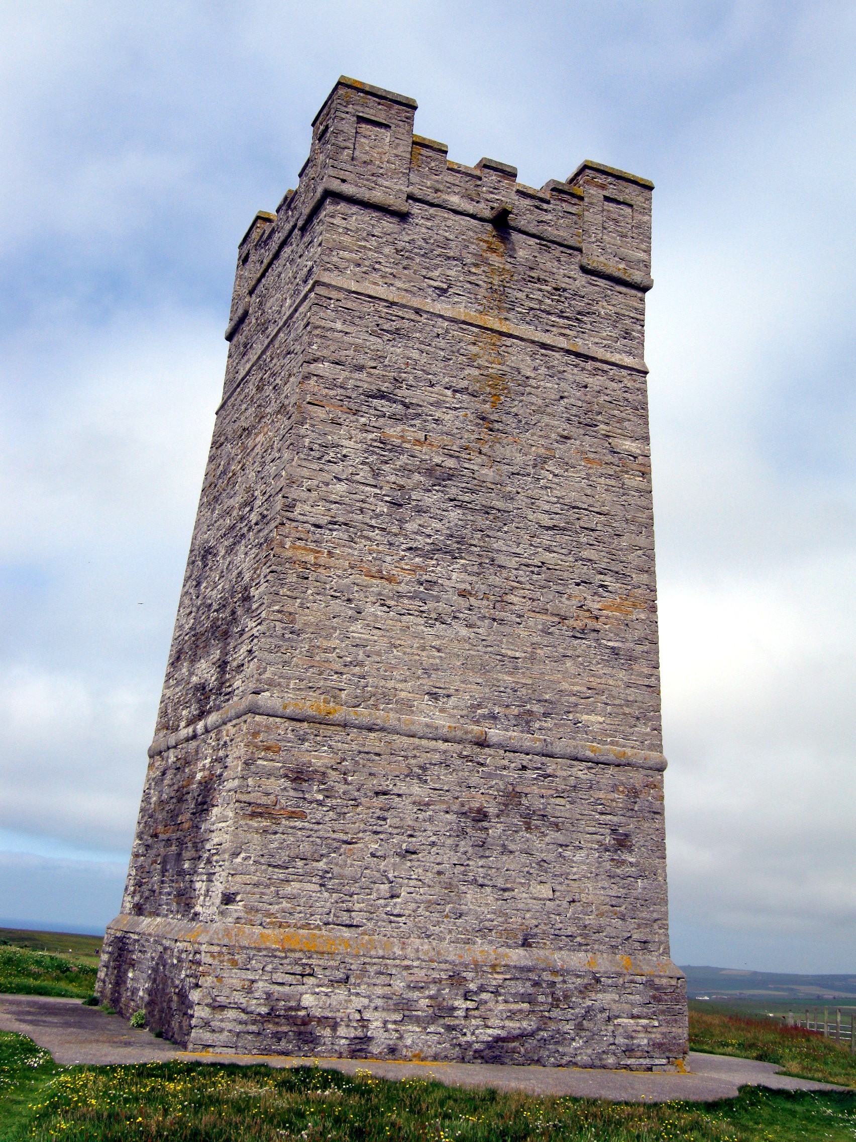 Turmmonument für Herbert Kitchener an der Westküste von Orkney-Mainland